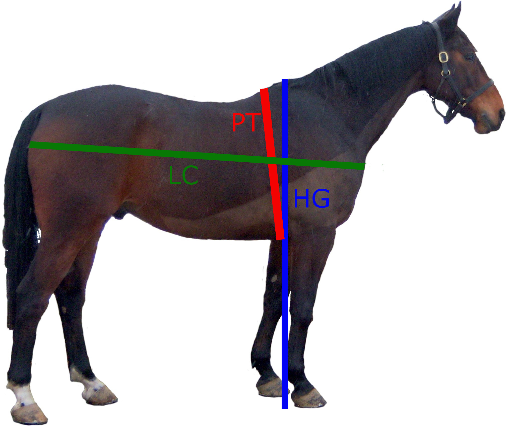 Schéma des mesures à prendre sur le cheval pour déterminer son poids : en bleu, HG, la hauteur au garrot. En rouge, PT, le périmètre thoracique. En vert, LC, la longueur du corps.